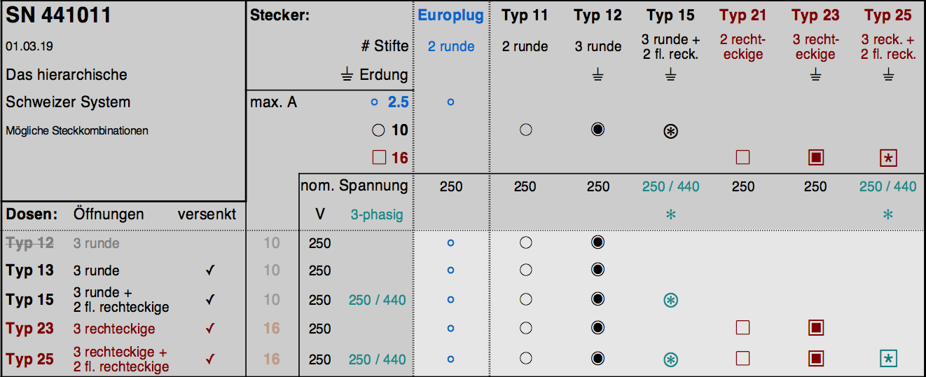 Die Norm SEV 1011:2009: Das hierarchische kompatible Schweizer System von Stromstecker und -steckdosen für den Haushaltsbereich.